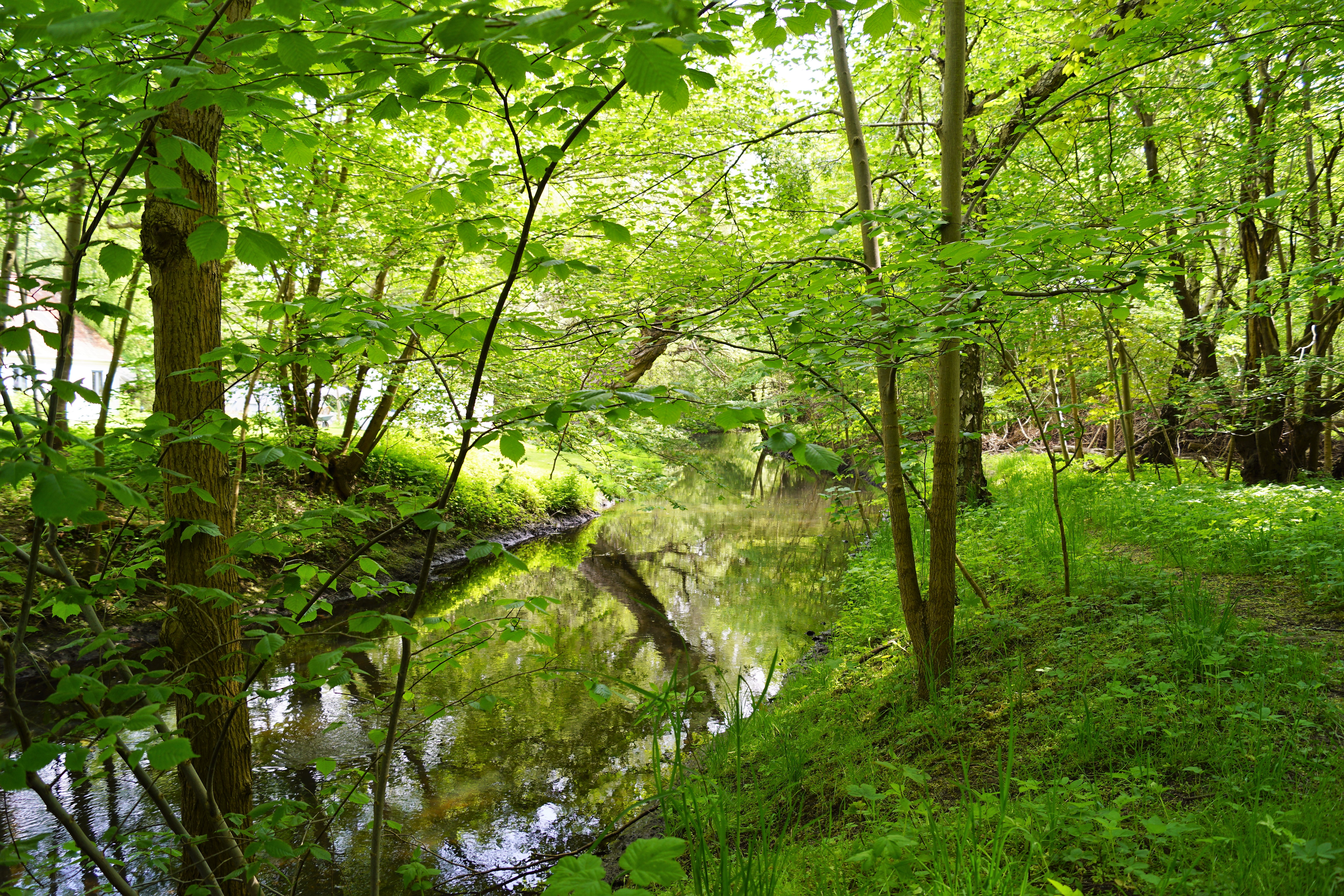 Nivå ved Nivågård Teglværk